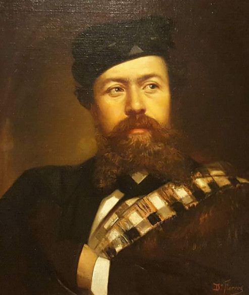 Autorretrato de Dionisio Fierros Álvarez, en 1866